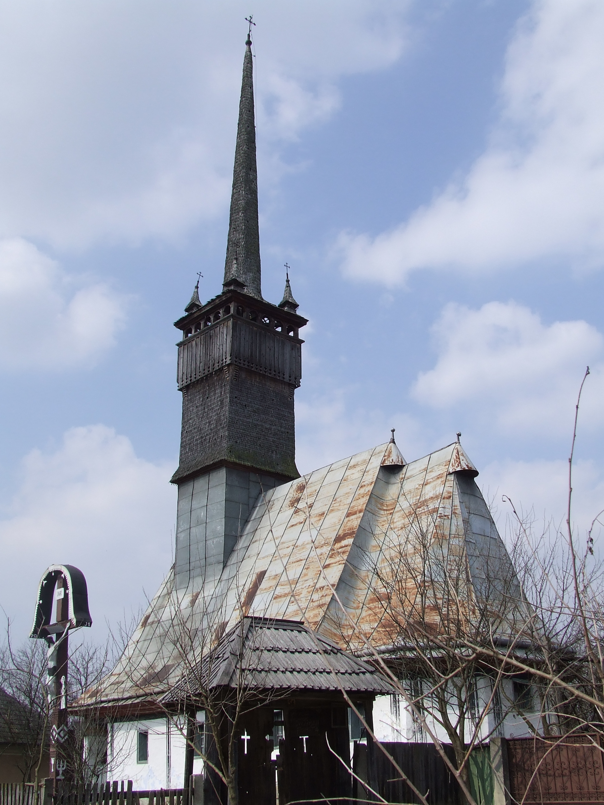 Biserica de lemn din Lozna, judeţul Sălaj.